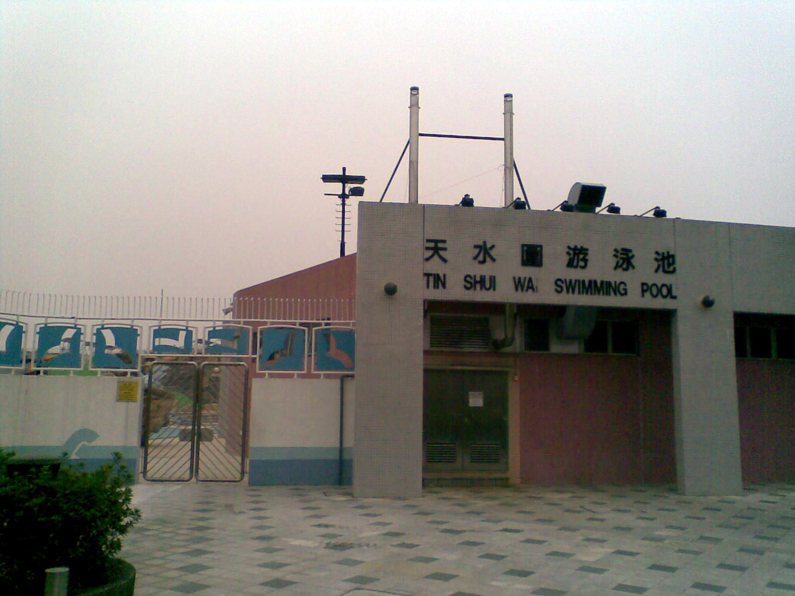 天水圍游泳池